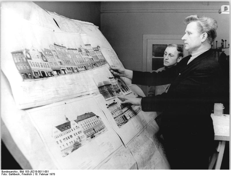 Leipzig, Architekt am Reißbrett Zentralbild Gahlbeck 18.2.1970 Altenburg-Bez. Leipzig: Wahlen - Große Initiative der Werktätigen und Einwohner. als Stadtarchitekt und Abgeordneter des Stadtparlamentes ist Werner Heidrich (Vordergrund) in seiner Stadt bekannt. Er ist Vorsitzender der Ständigen Kommission Bauwesen und Mitglied der LDPD. Zu seiner gegenwärtigen Hauptaufgabe gehört die komplexe Verschönerung der gesamten Altstadt. Unter Zugrundelegung von dokumentarischen Aufnahmen gestaltet er gegenwärtig die Farbkonzeption für die Renovierung ganzer Straßenzüge. Werner Heidrich ist seit einer Wahlperiode Abgeordneter und kandidiert wieder für die Stadtverordnetenversammlung. Information Altenburg - seit dem 11. Jahrhundert erstmalig sicher erwähnt - erblühte nach 1945 zu einer sozialistischen Stadt. 45 Betriebe aller Eigentumsformen vereinen heute ihre Mittel und Kräfte für die effektivste Lösung der Planaufgaben. Kürzlich wurde ein Komplexvertrag zwischen dem Rat, der über 50.000 Einwohner zählenden Stadt (1818-10,160 E.), und den Betrieben vor dem Plenum der Stadtverordnetenversammlung unterzeichnet. Die Betriebe stellten mehr als 2 Millionen Mark zur Verfügung. Es entstanden neue Wohnensemble, ein Volkspark wurde geschaffen, in dem zur Zeit eine moderne Schwimmhalle mit Milchbar entsteht. Die Mittel wurden auch für die Schaffung von 35 Kinderkrippen - und 220 Kindergartenplätzen verwendet.